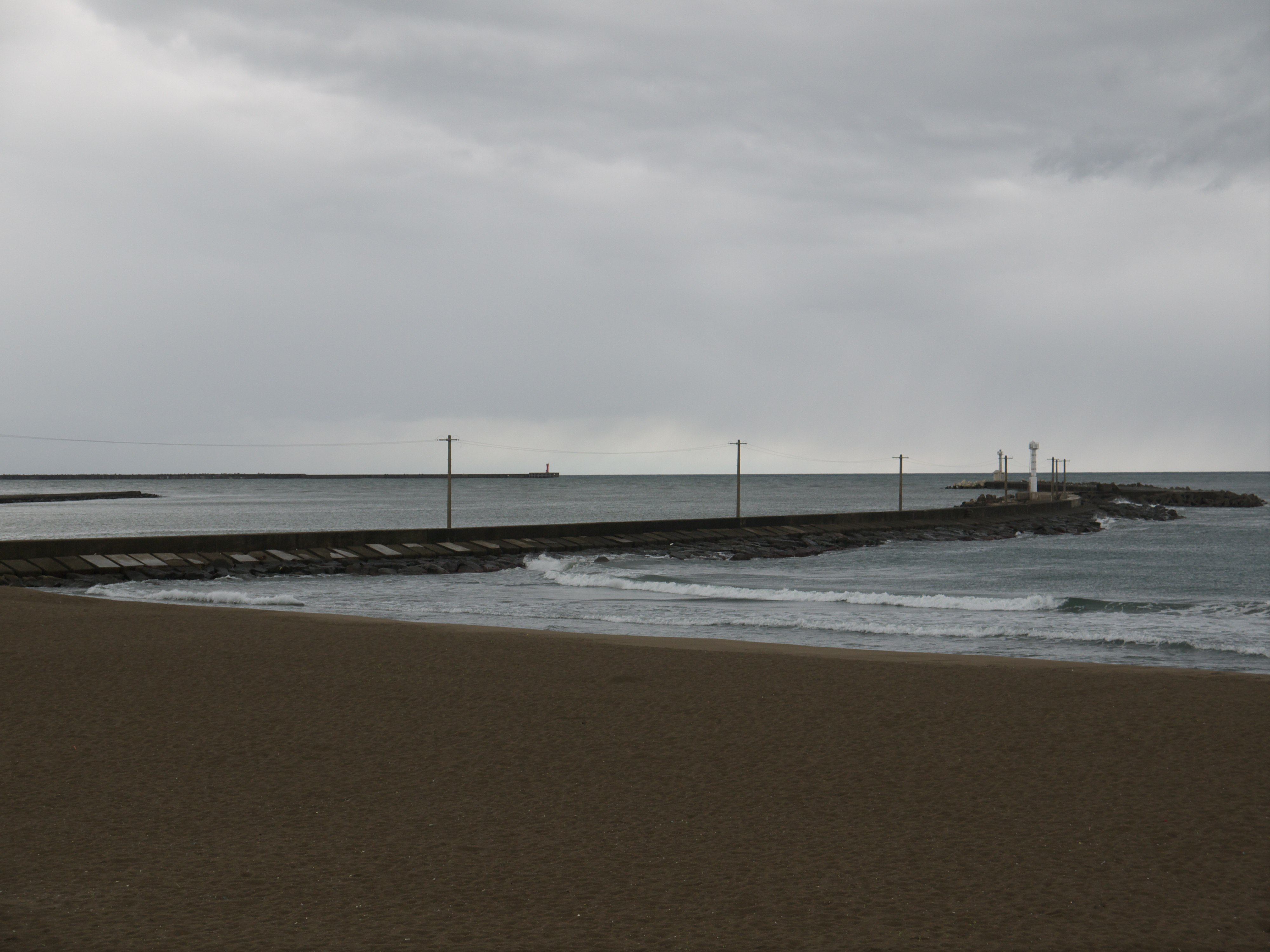 福井県坂井市にある三国湊堰堤。明治期建設。